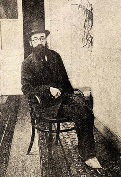 "El insigne escritor español D. Ramón del Valle-Inclán". Reportaje de Revista chilena "Sucesos" del 20 de octubre de 1910 titulada "Dos viajeros ilustres".